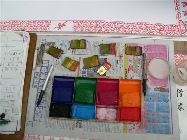 花鸟字创作工具 2005年2月14日拍摄于白云观庙会